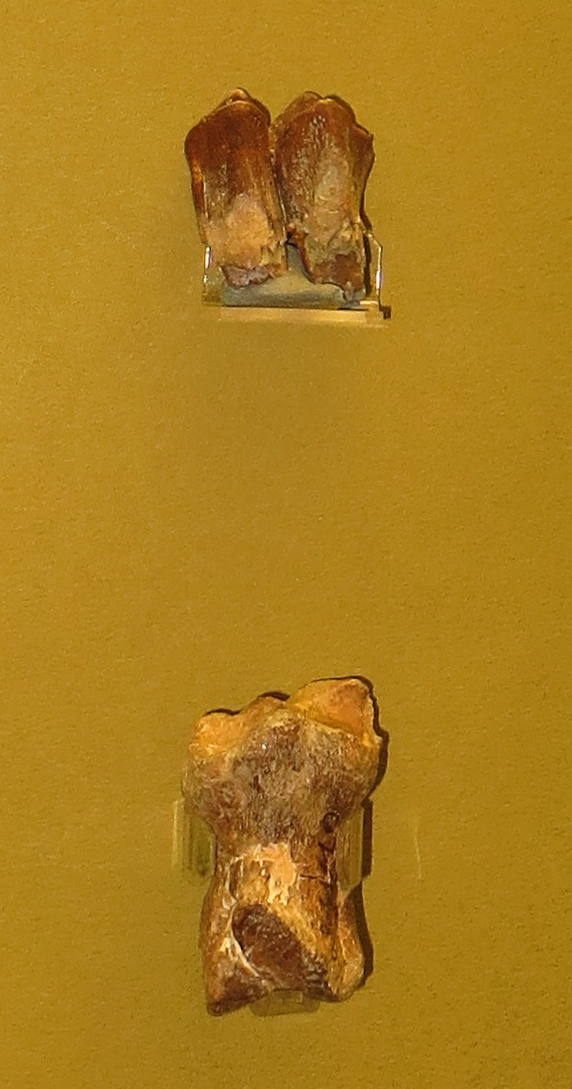 Fossil - took the picture at Museo Scienze Naturali di Faenza